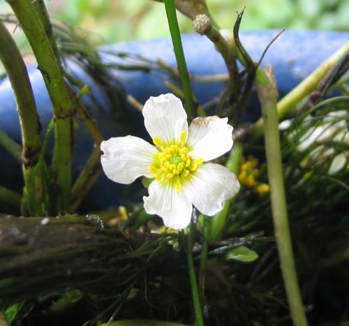 Blüte des flutenden Hahnenfußes